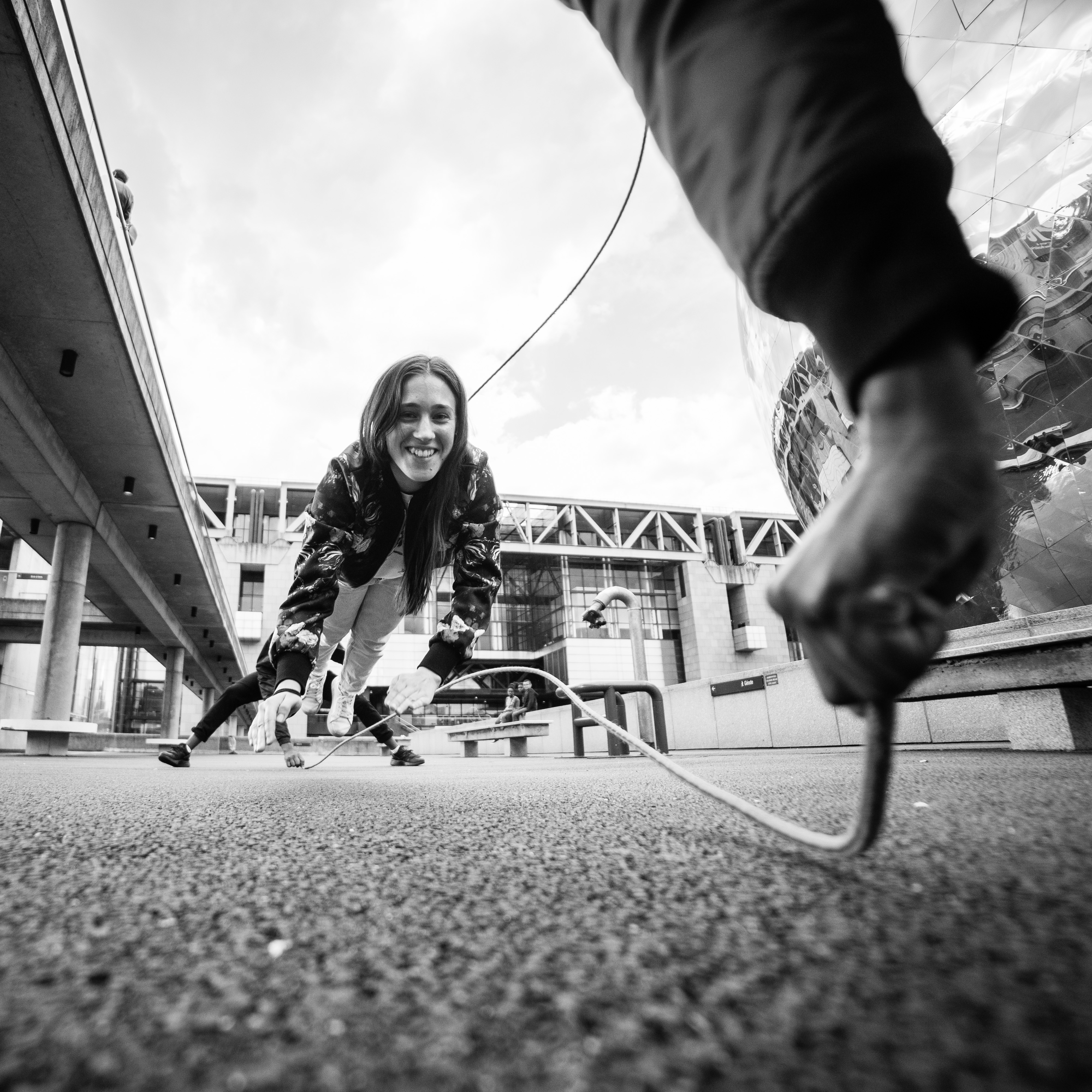 Photo de Double Dutch de The Ropestylers prise par le photographe Adrien Plaud